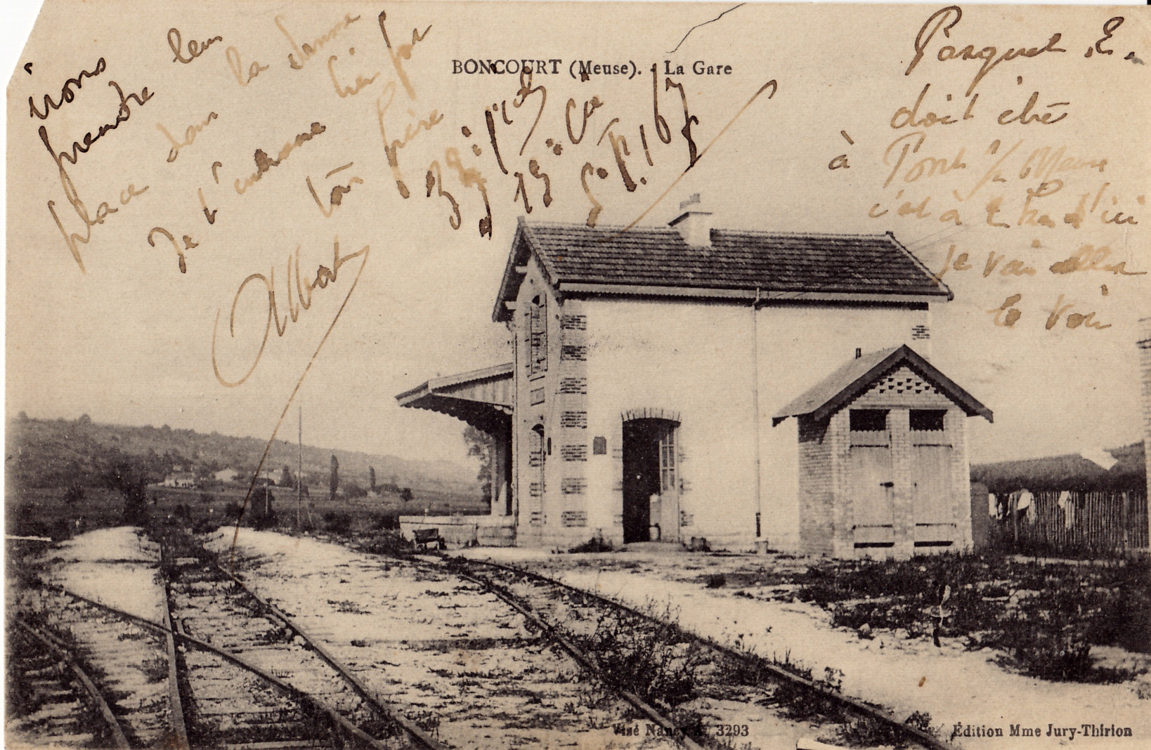 Carte postale ancienne éditée par Mme Jury-Thirion : BONCOURT - La Gare. Mention de censure : Visé Nancy 3293